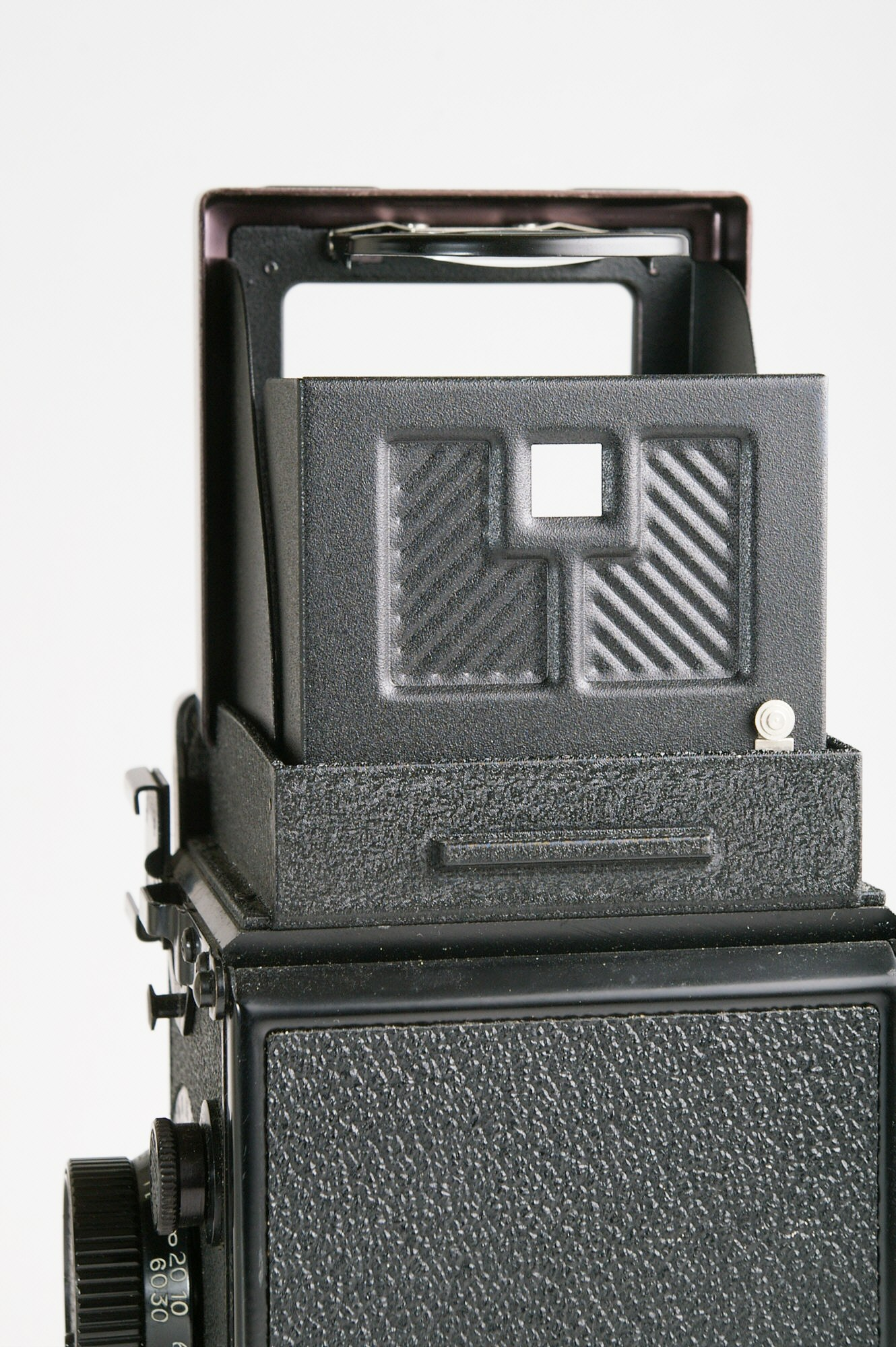 Yashica Mat 124 G mit geöffnetem Faltlichtschachtsucher. Ansicht von der Rückseite auf den sog. Sportsucher, ein einfacher Rahmensucher. Oben ist die hochgeklappte Sucherlupe zu erkennen.